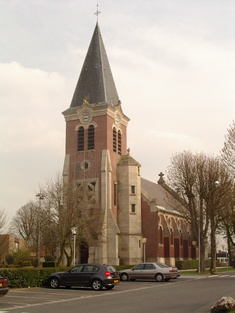 Eglise Saint Martin Méricourt